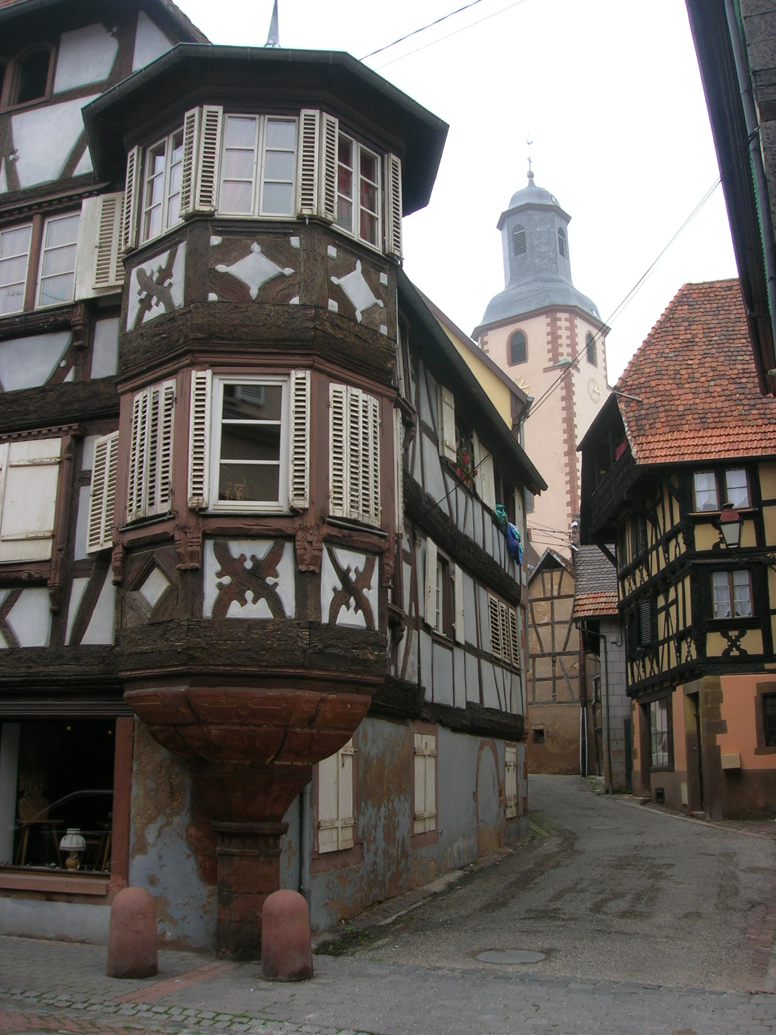 Street in Bouxwiller, Alsace.